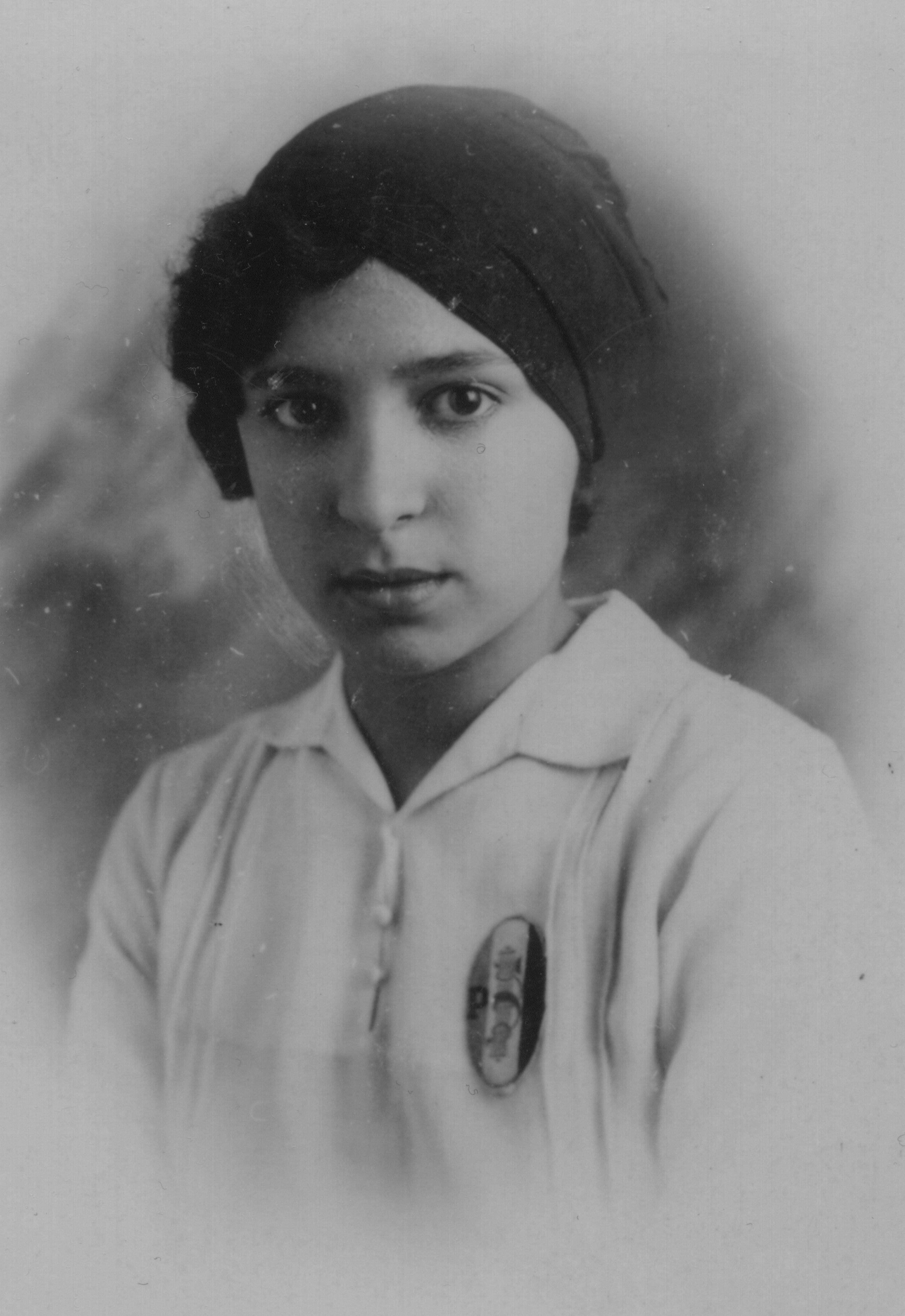 Piccola Italiana della GIL (Gioventù Italiana del Littorio)